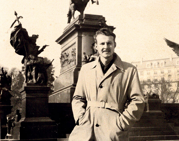 Raimo "Höyry" Häyrinen 19-vuotiaana (vuosi 1959 tai 1960) Argentiinan pääkaupungissa Buenos Airesissa.